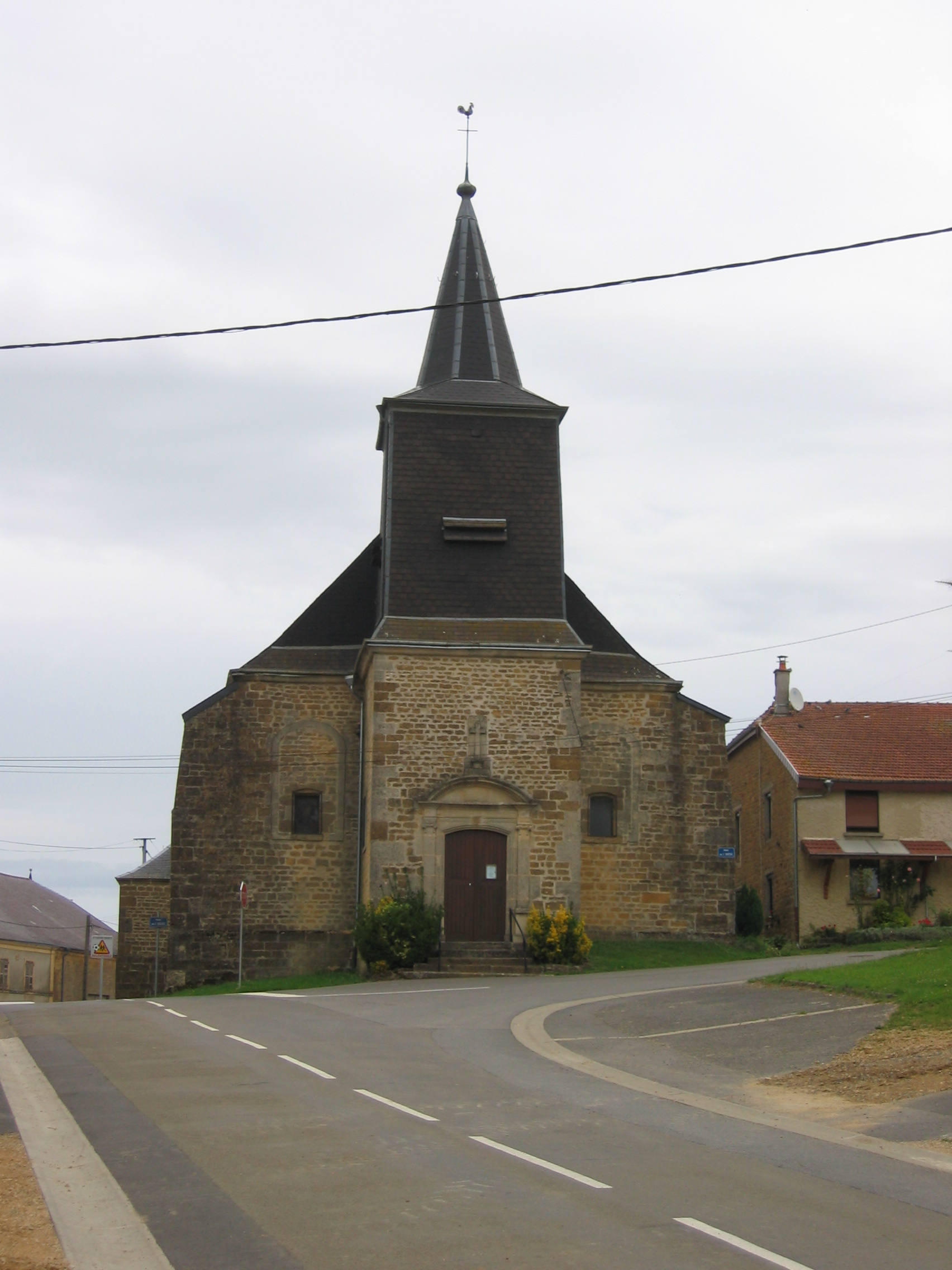 Eglise Amblimont Ardennes France